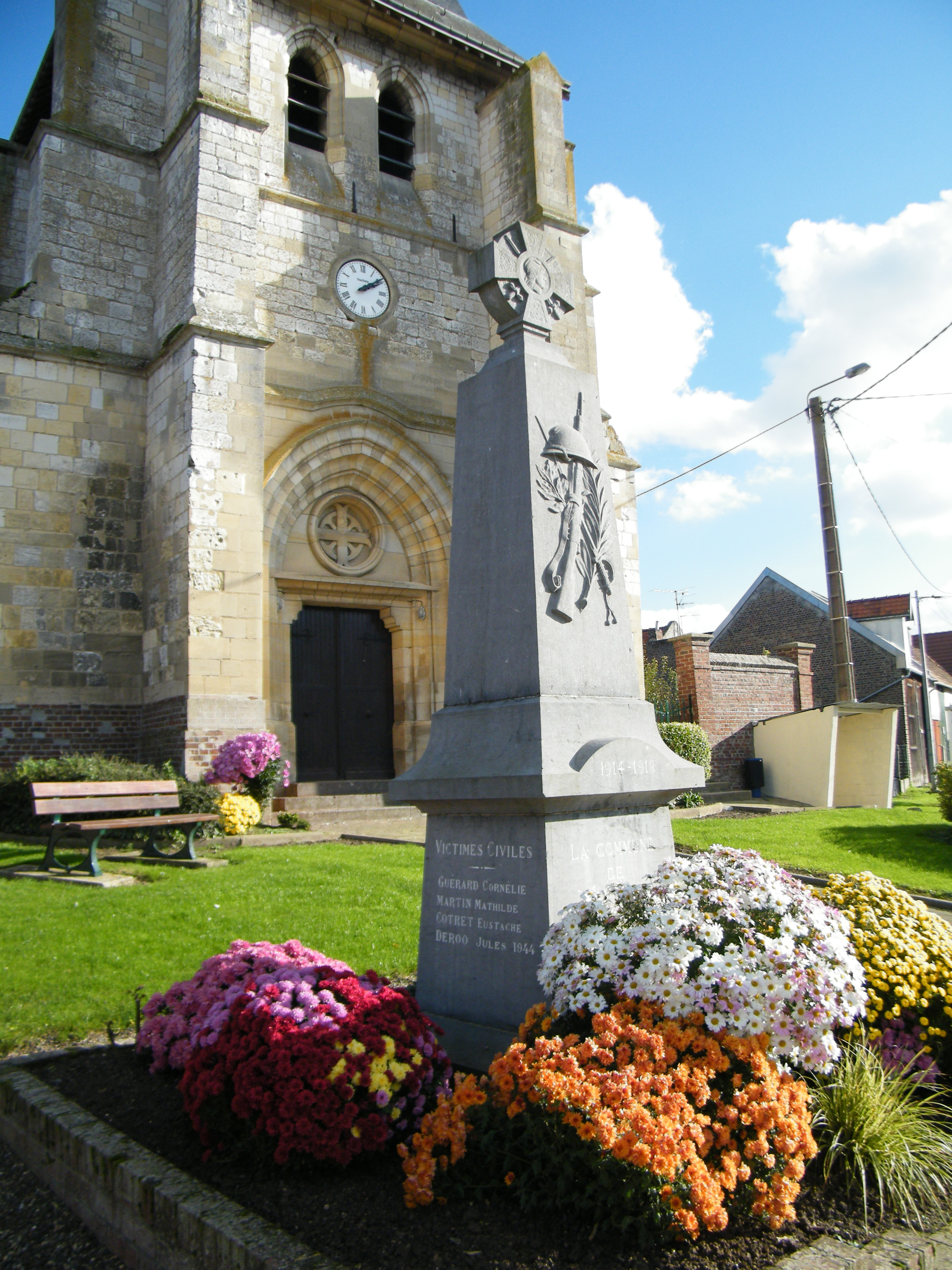 Le monument aux morts pour la patrie et l'entrée de l'église.